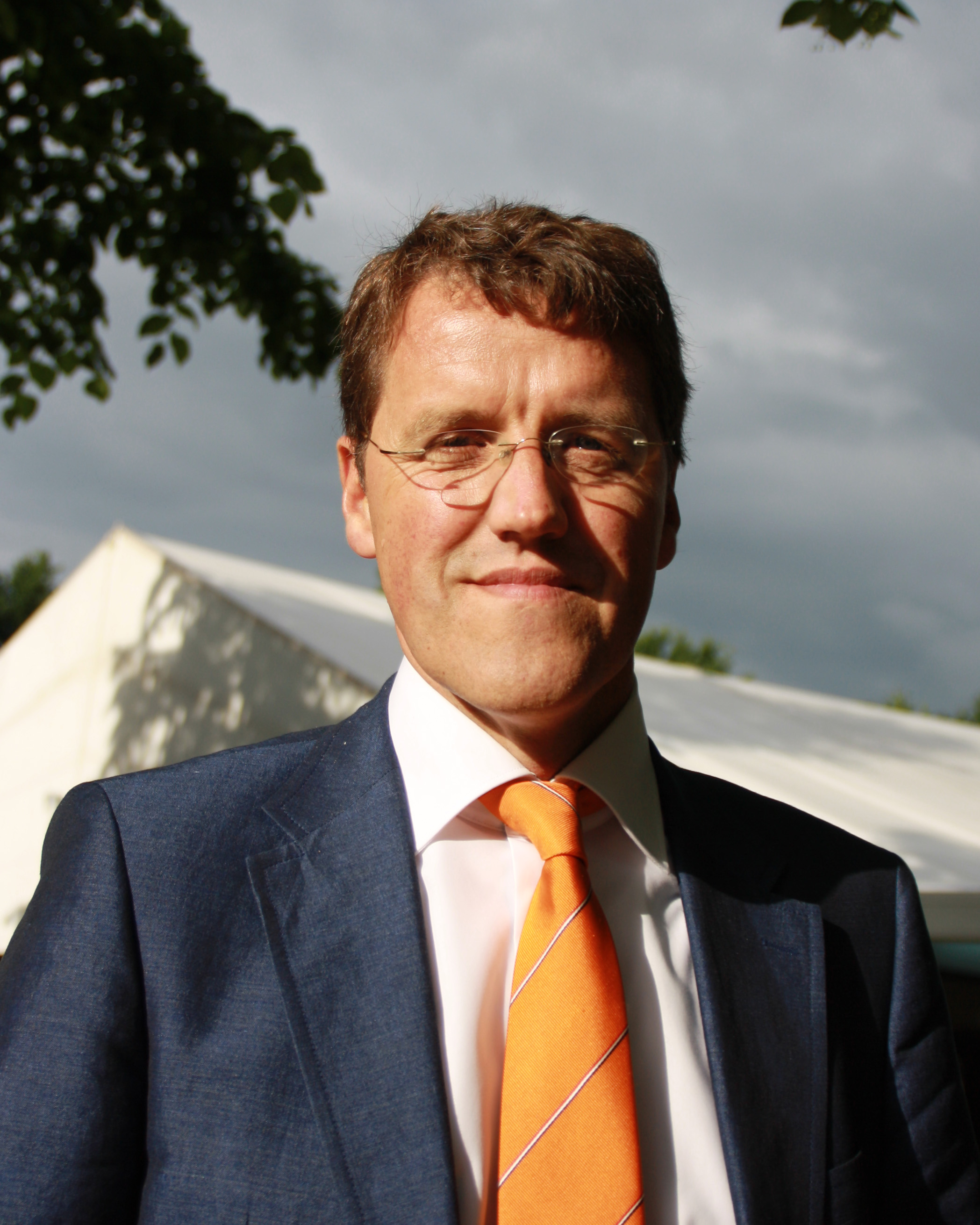 Eric van Oosterhout (6 april 1961), burgemeester van de Nederlandse gemeente Aa en Hunze.